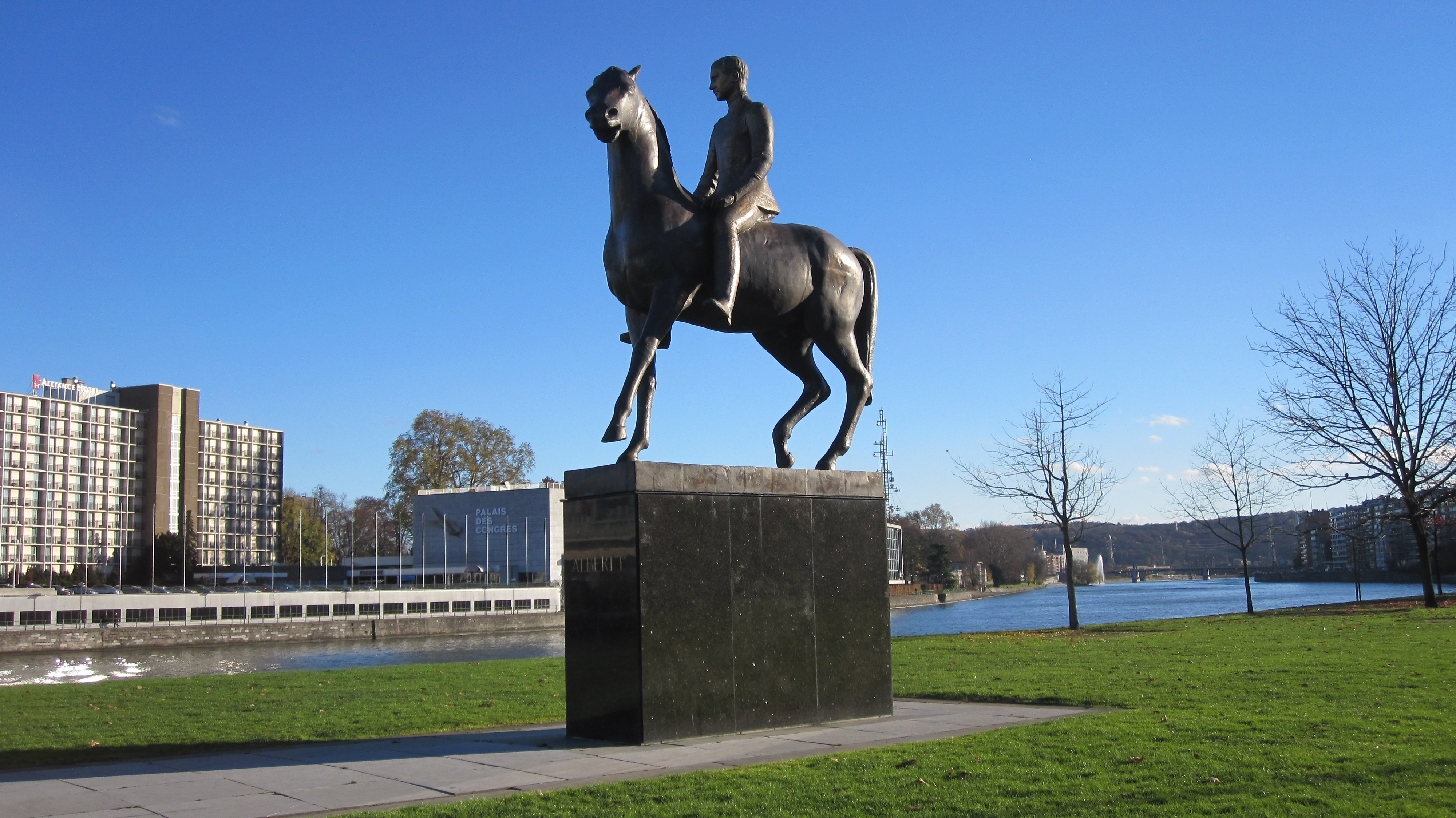 Statue équestre du roi Albert Ier